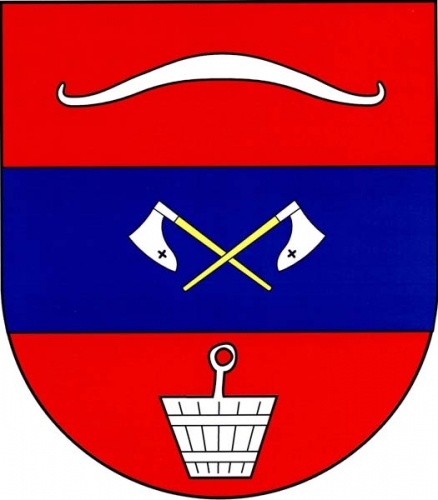 znak, Pucov, okres Třebíč